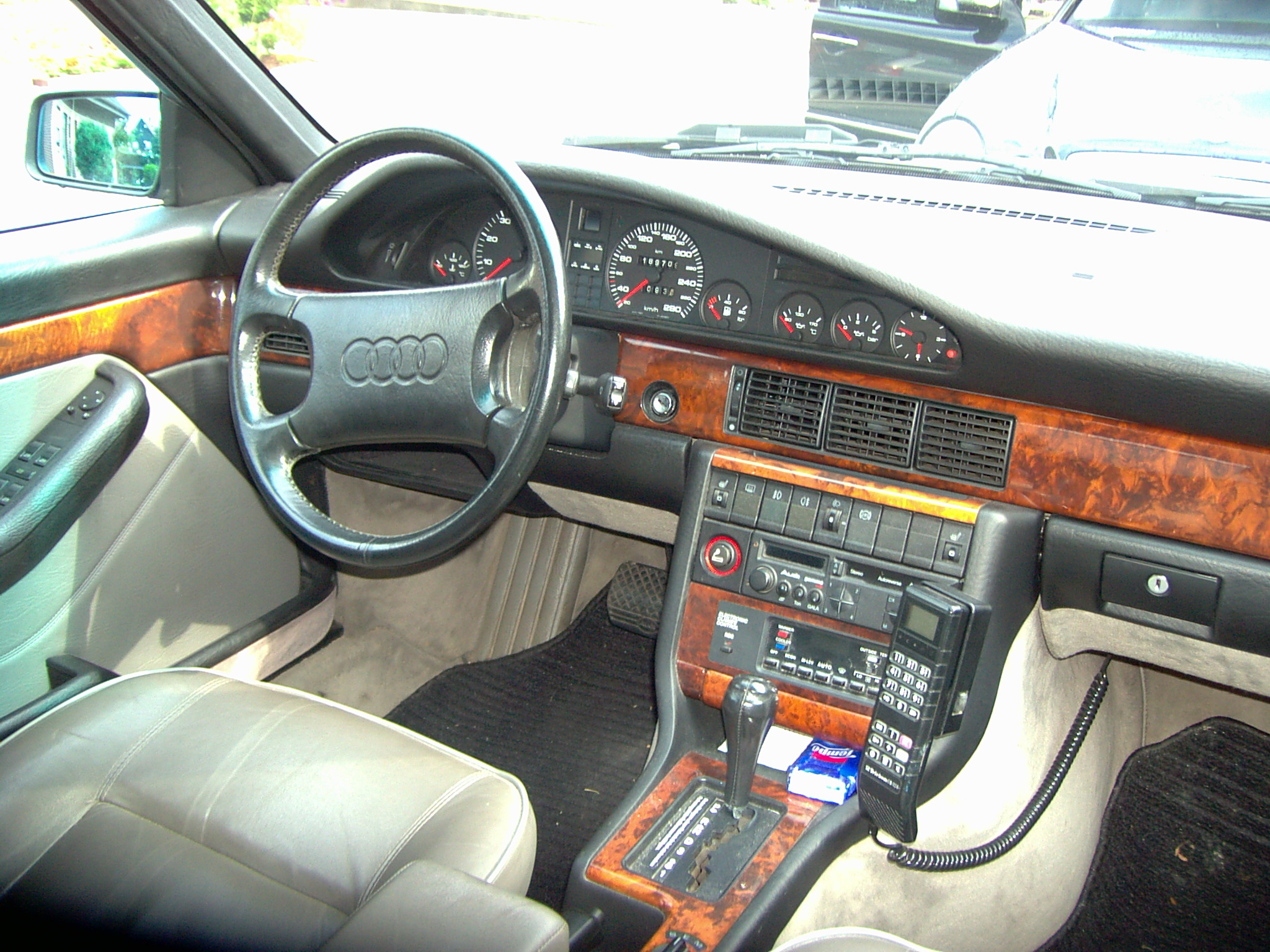 selbst aufgenommen